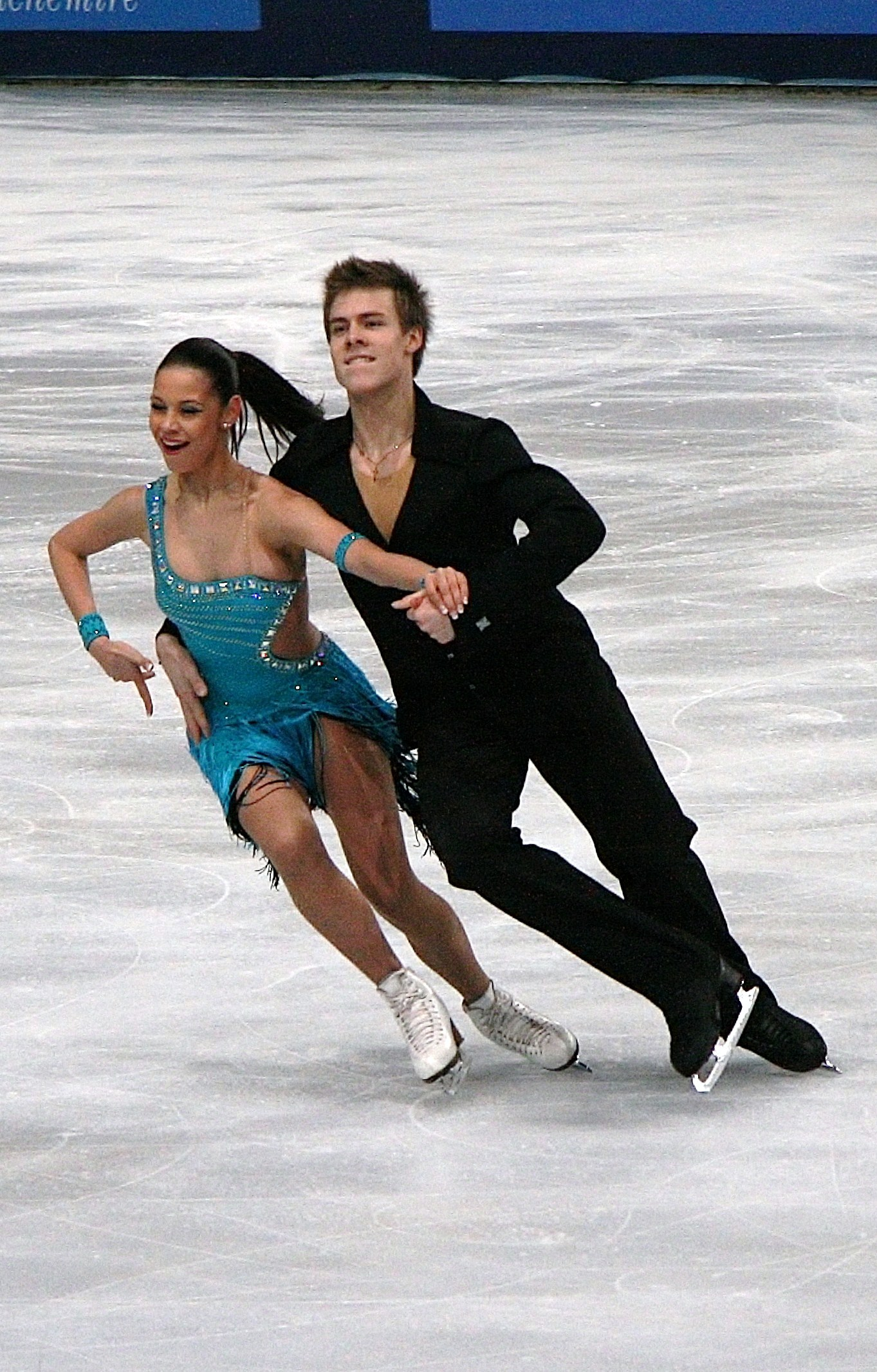 Елена Ильиных и Никита Кацалапов на 2011 Trophée Eric Bompard